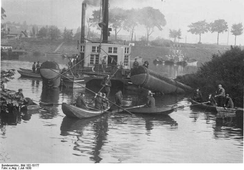 Die furchtbare Brückeneinsturz-Katastrophe in Koblenz! Überblick über die Unglücksstelle während der ersten Rettungsmassnahmen.